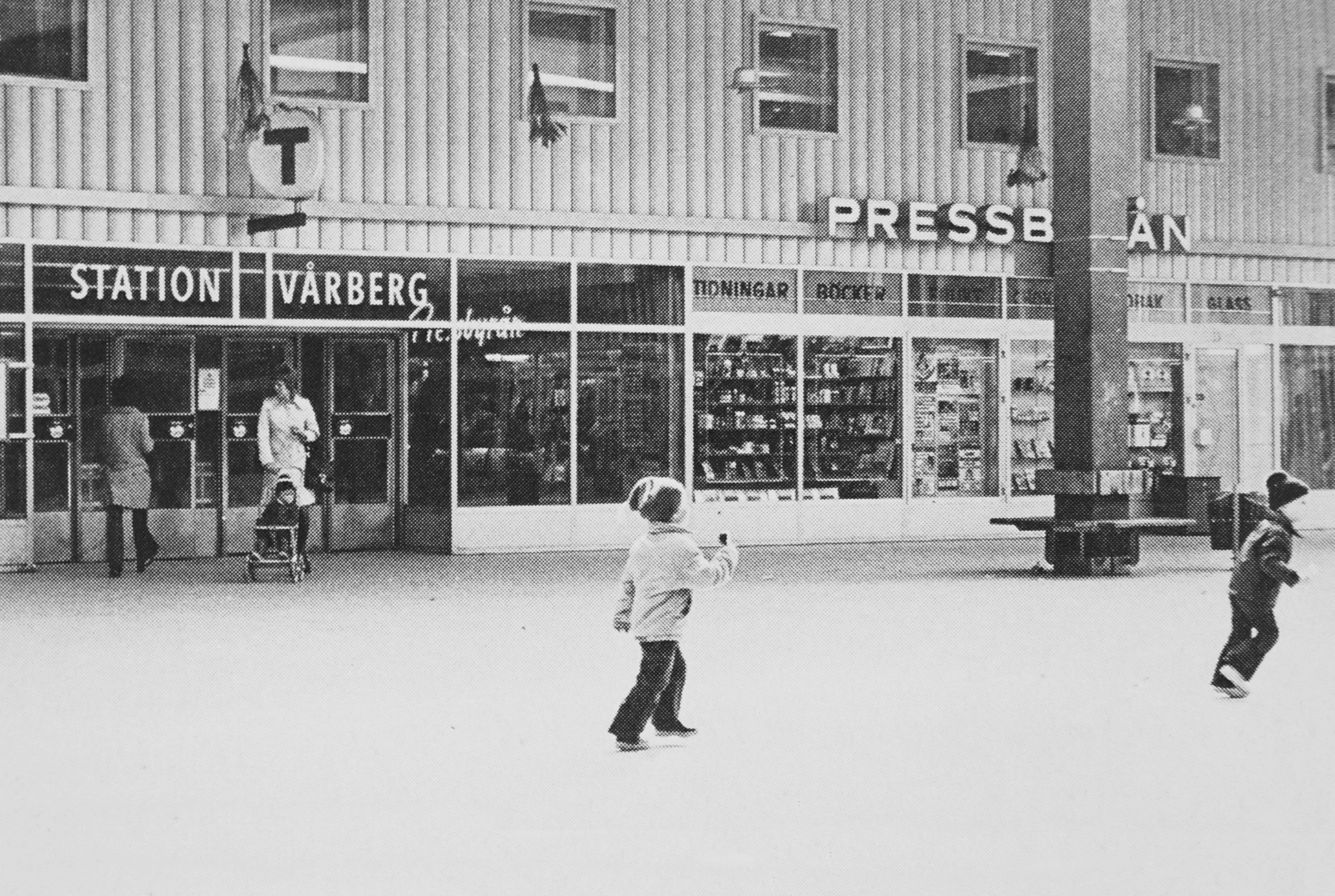 Vårberg Centrum med tunnelbanestationen